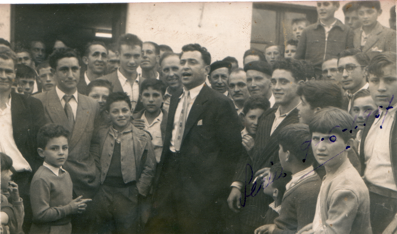 José Noriega cantando asturiano en Serín (Asturias) el 09 de junio de 1957